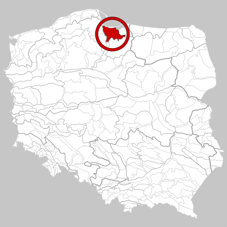 Physico-geographical regionalization of Poland Mezoregion 313.54 Vistula Delta Depression Regionalizacja fizycznogeograficzna Polski Mezoregion 313.54 Żuławy Wiślane